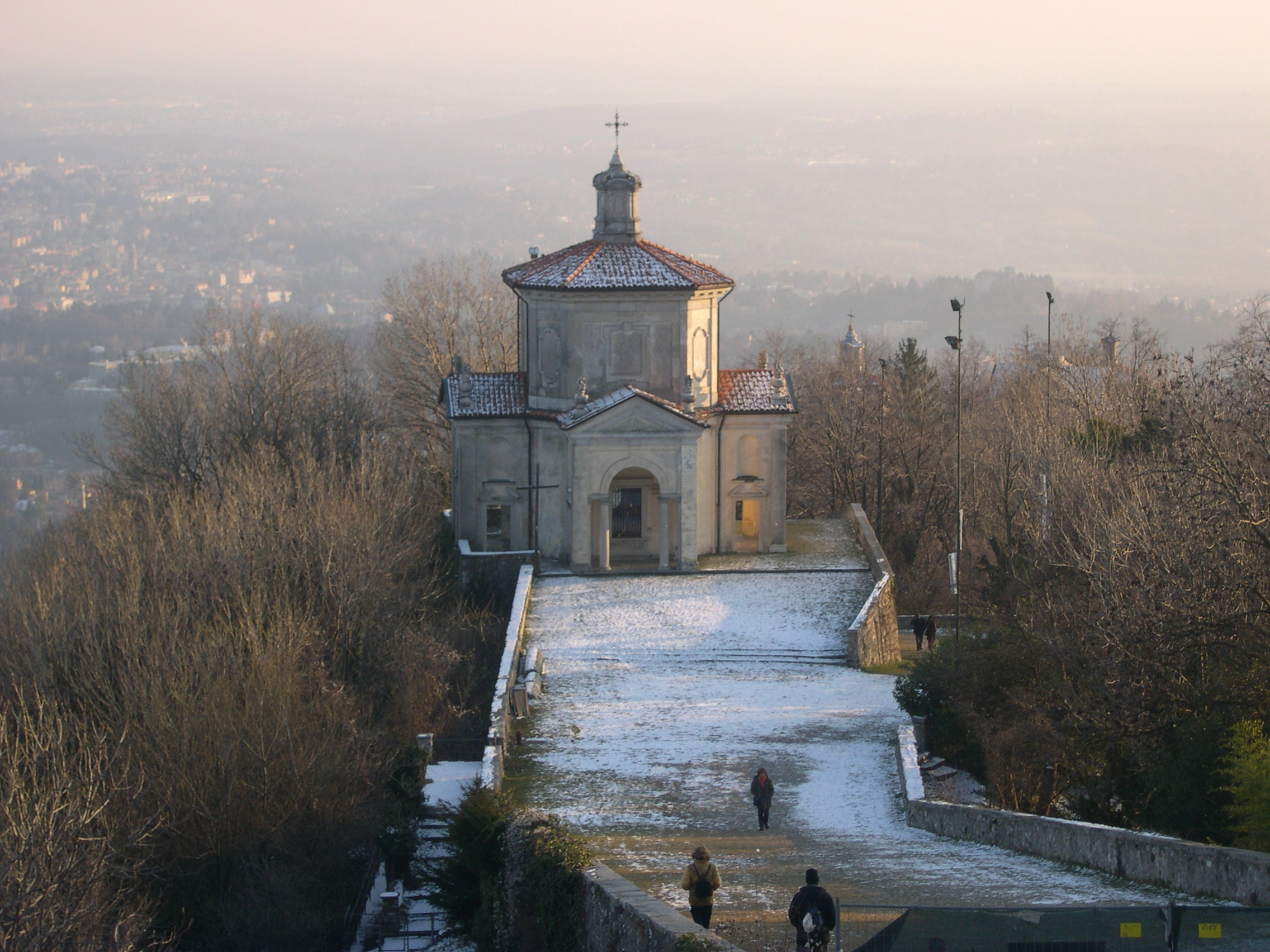 Chapel XIV of Sacro Monte (Varese)